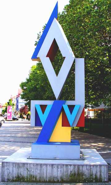 "Stadtzeichen 69/74" von Otto Herbert Hajek - in Stuttgart-Wangen selbst fotografiert von user:Enslin am 30-04-2005